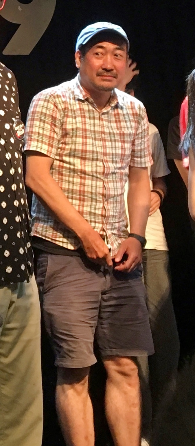 ほりかわひろき（2018年8月8日、LOFT9 Shibuya）